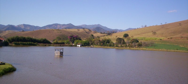 Foto do bairro Boa Vista, em Itamonte/MG/Brasil